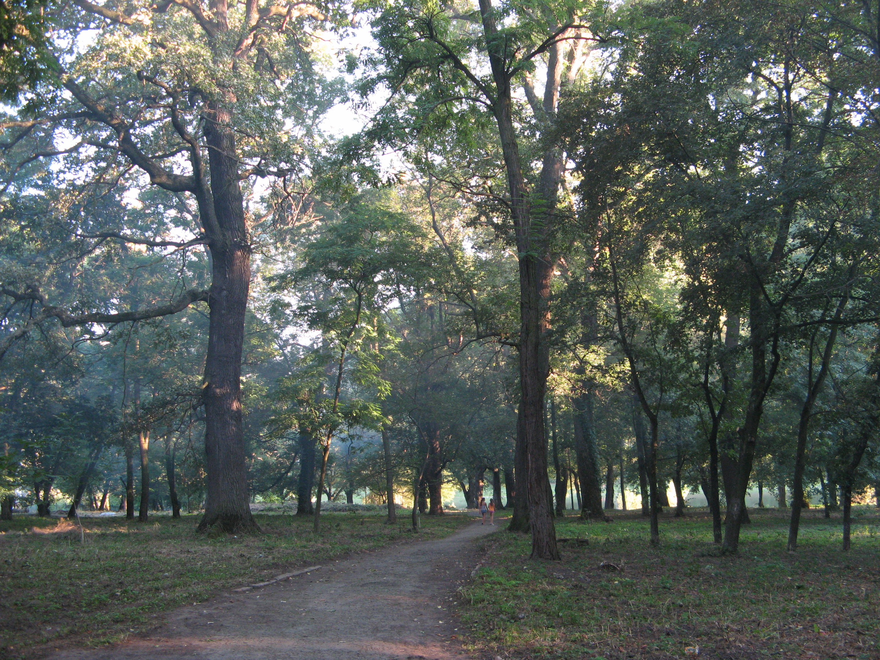 Заліщицький парк. Тернопільська обл., м. Заліщики